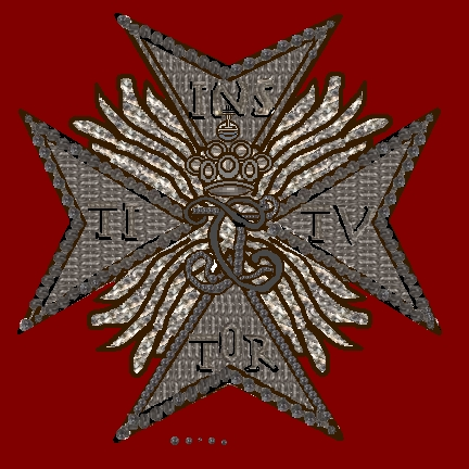 Eigen tekening naar een oud zeer verkleurd en versleten exemplaarop de website van een antquiteitenhandelaar.